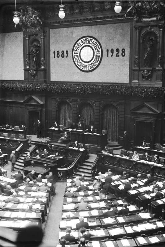 Der große Congress der Inter-Parlamentarischen Union im Reichstag in Berlin! Wichtige ausländische Deligationen, welche an dem Congress teilnehmen. Blick in den großen Plenarsitzungssaal des Reichstages während des Congresses der Inter-Parlamentarischen Union.